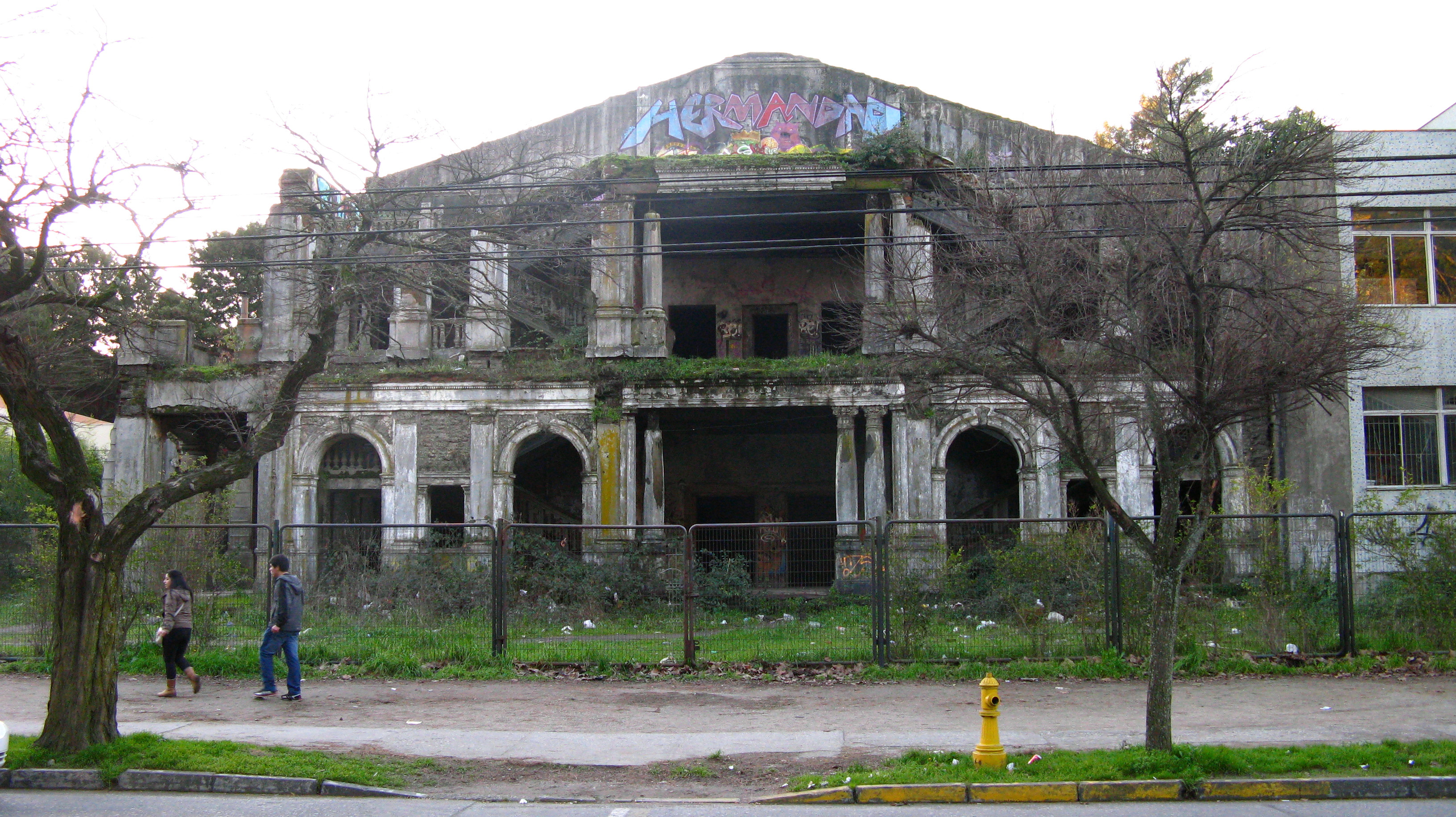 Antiguo Teatro Enrique Molina Concepción, Chile Julio de 2012